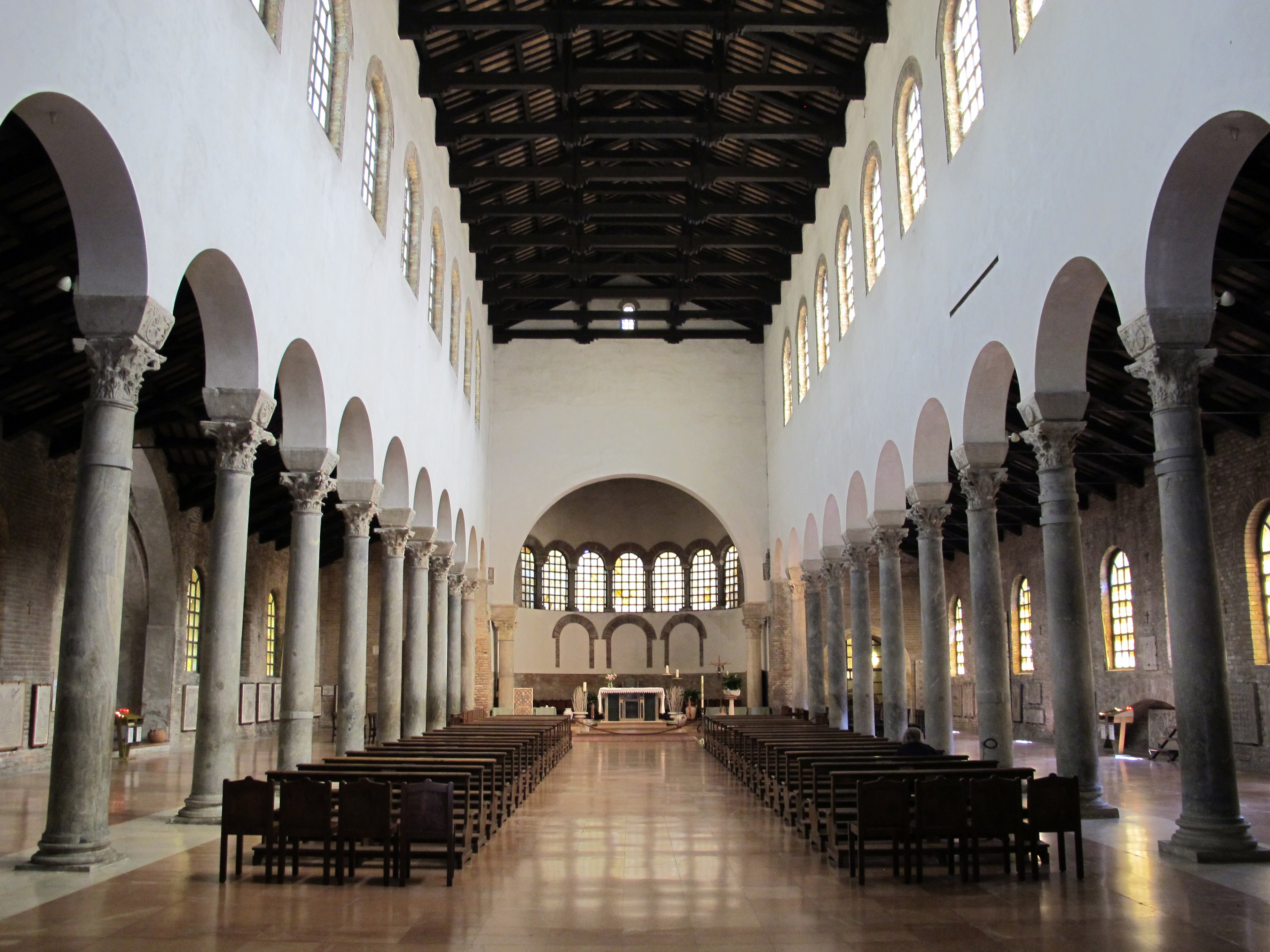 Ravenna, san giovanni evagelista, int.